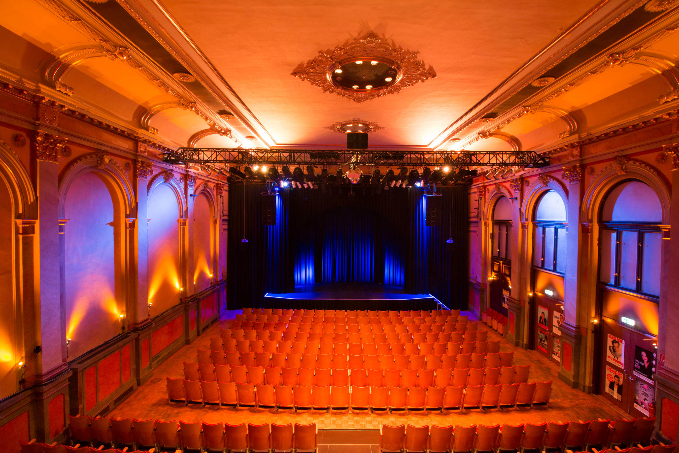 Ansicht des STADTSAAL vom Balkon